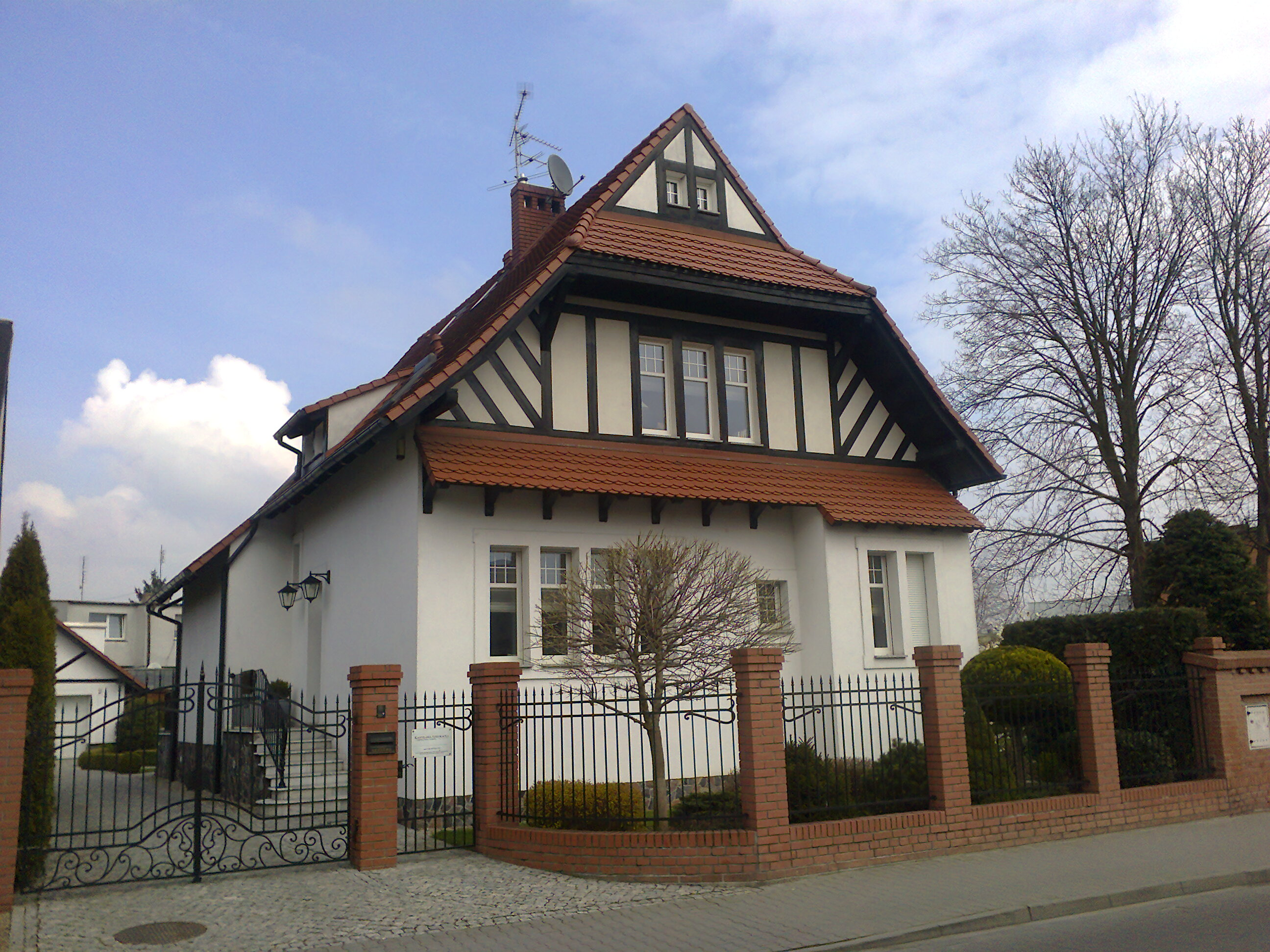 Willa przy ul. Żwirki i Wigury, Grodzisk Wlkp.